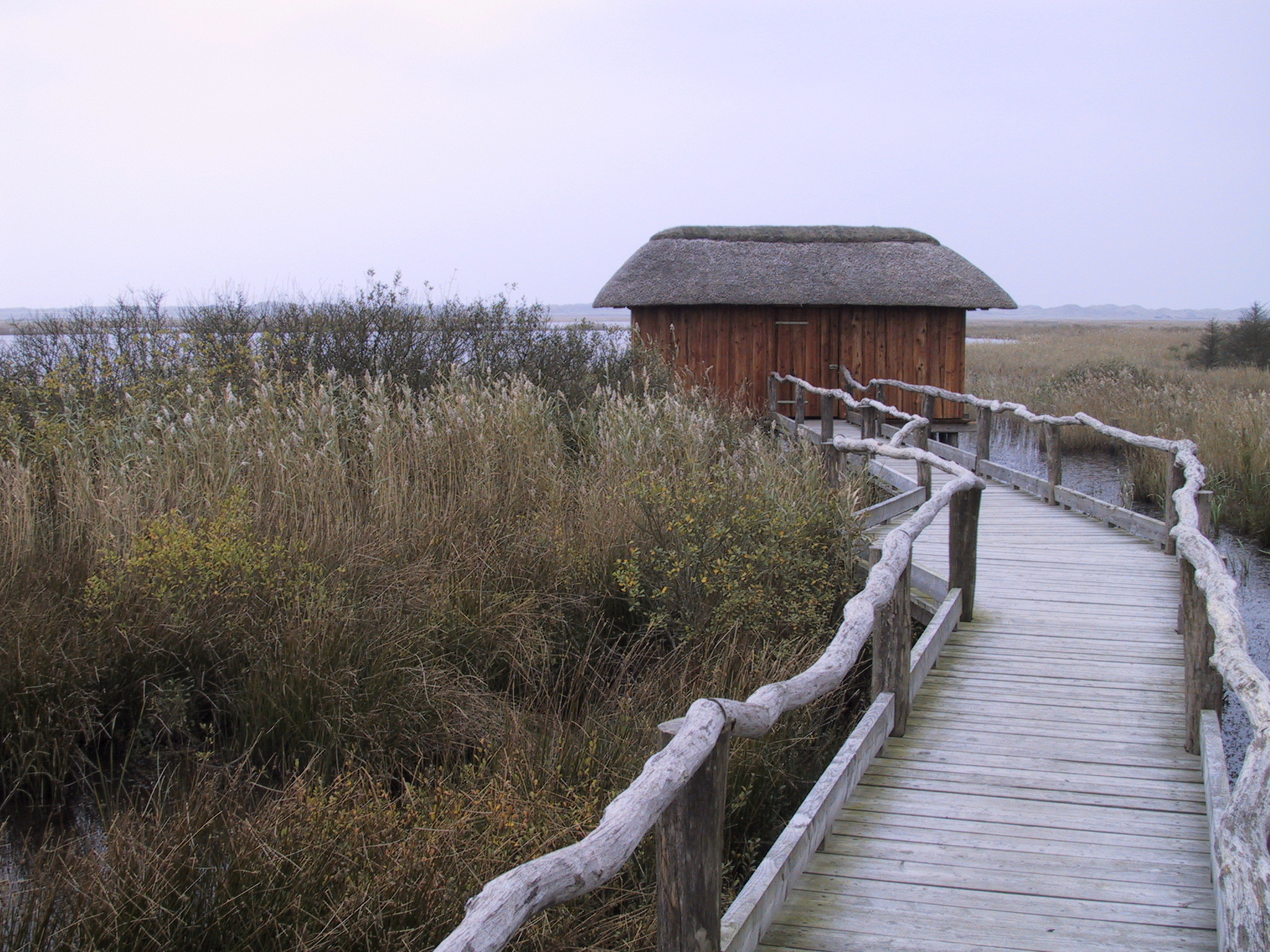 Veststadil fjord, Danmark